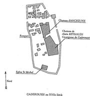 Plan de Caderousse avec ses châteaux et son église